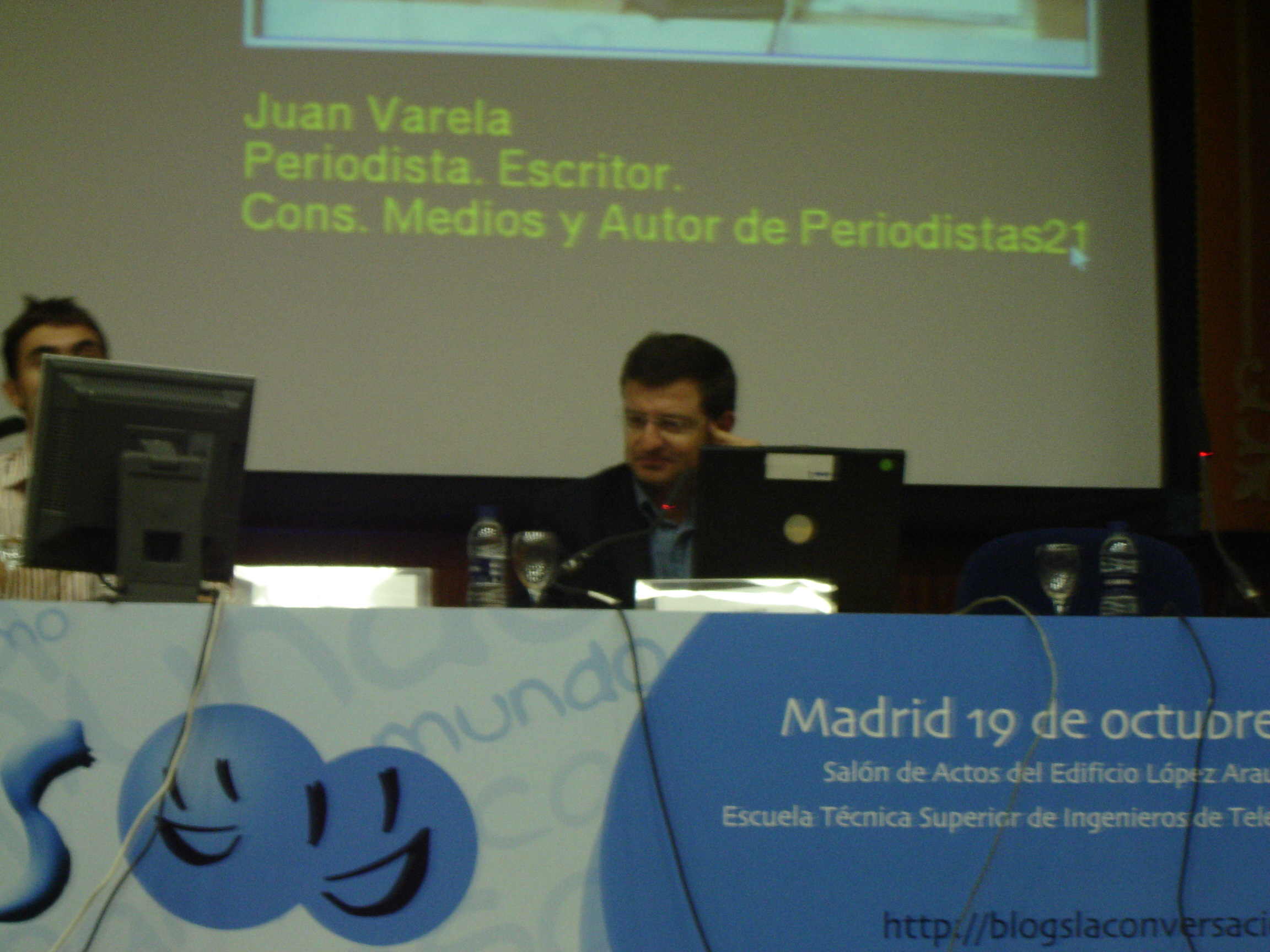 Ignaci Guardans